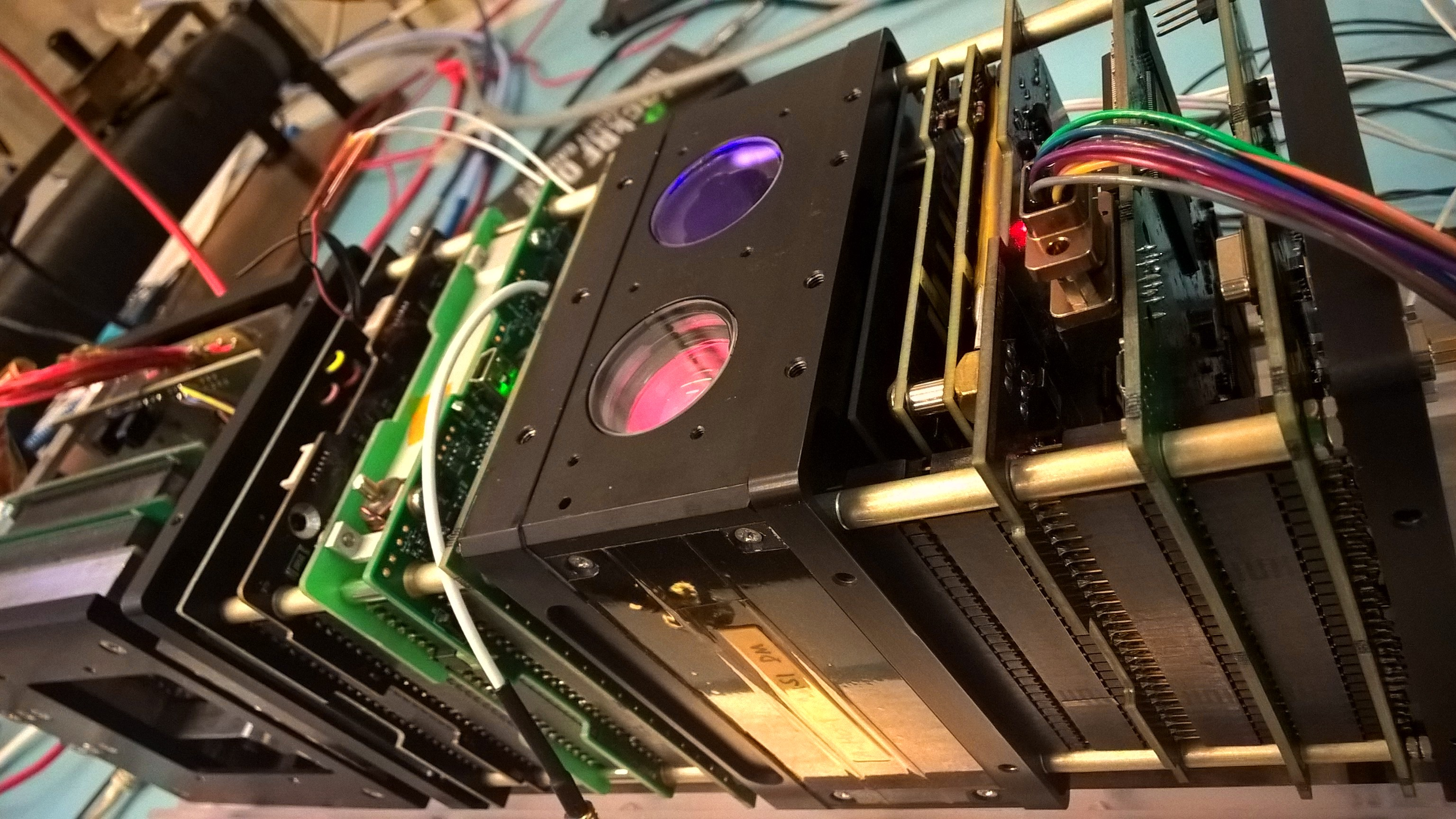 AaSI-spektrometri.